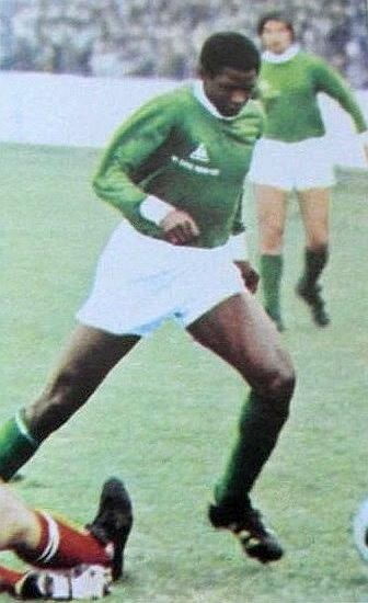 Salif Keita en 1971, 'Ageducatifs Football 1971 - 1972', Panini figurina n°255